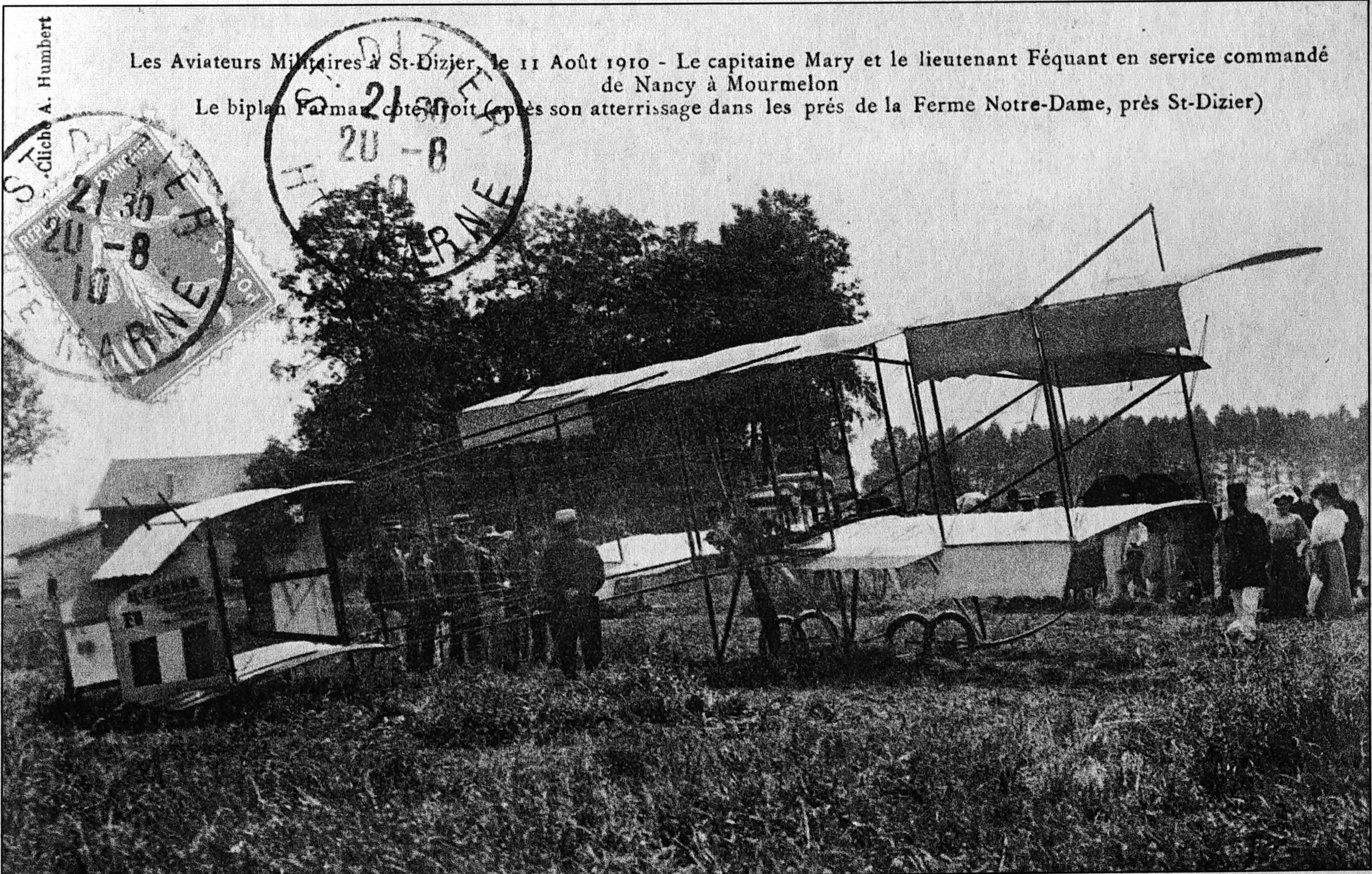 vue de cf. titre.